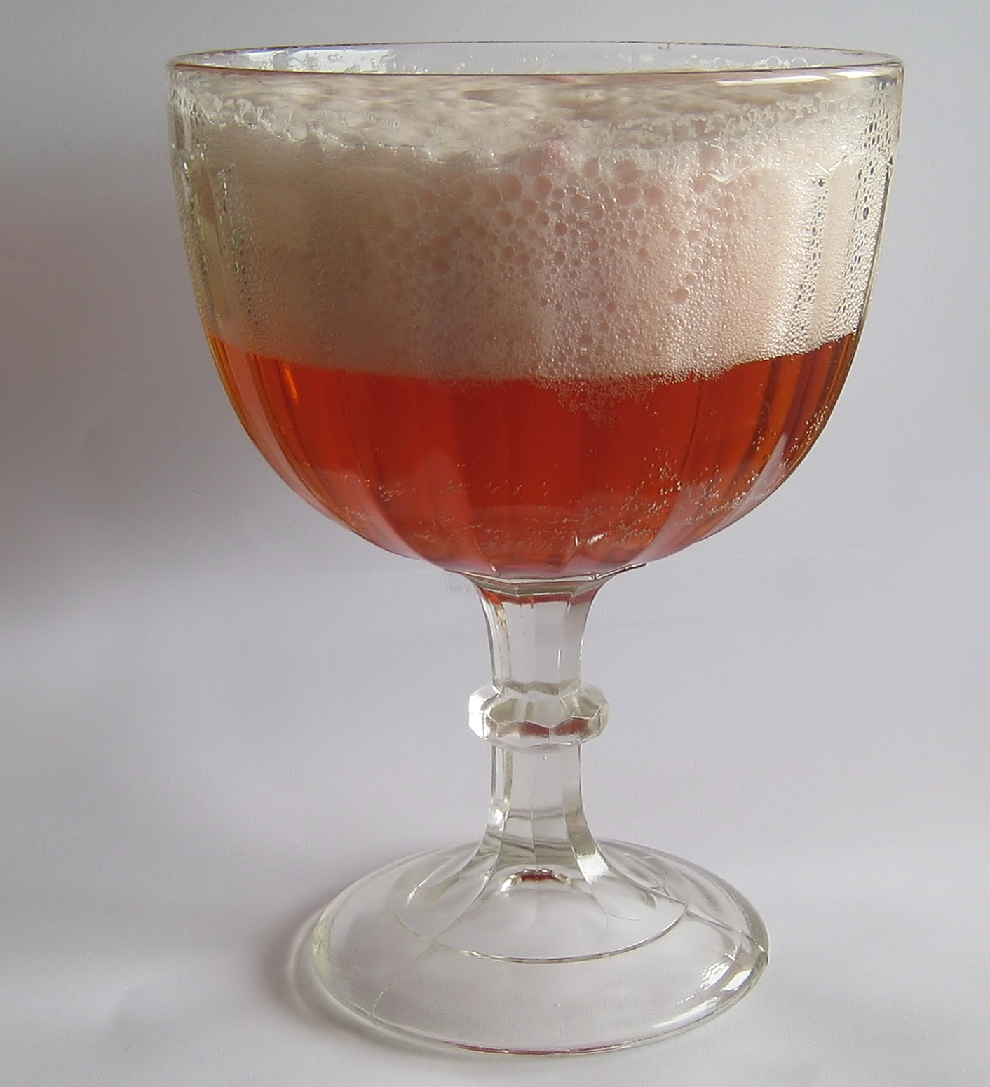 Berliner Weisse mit Schuss